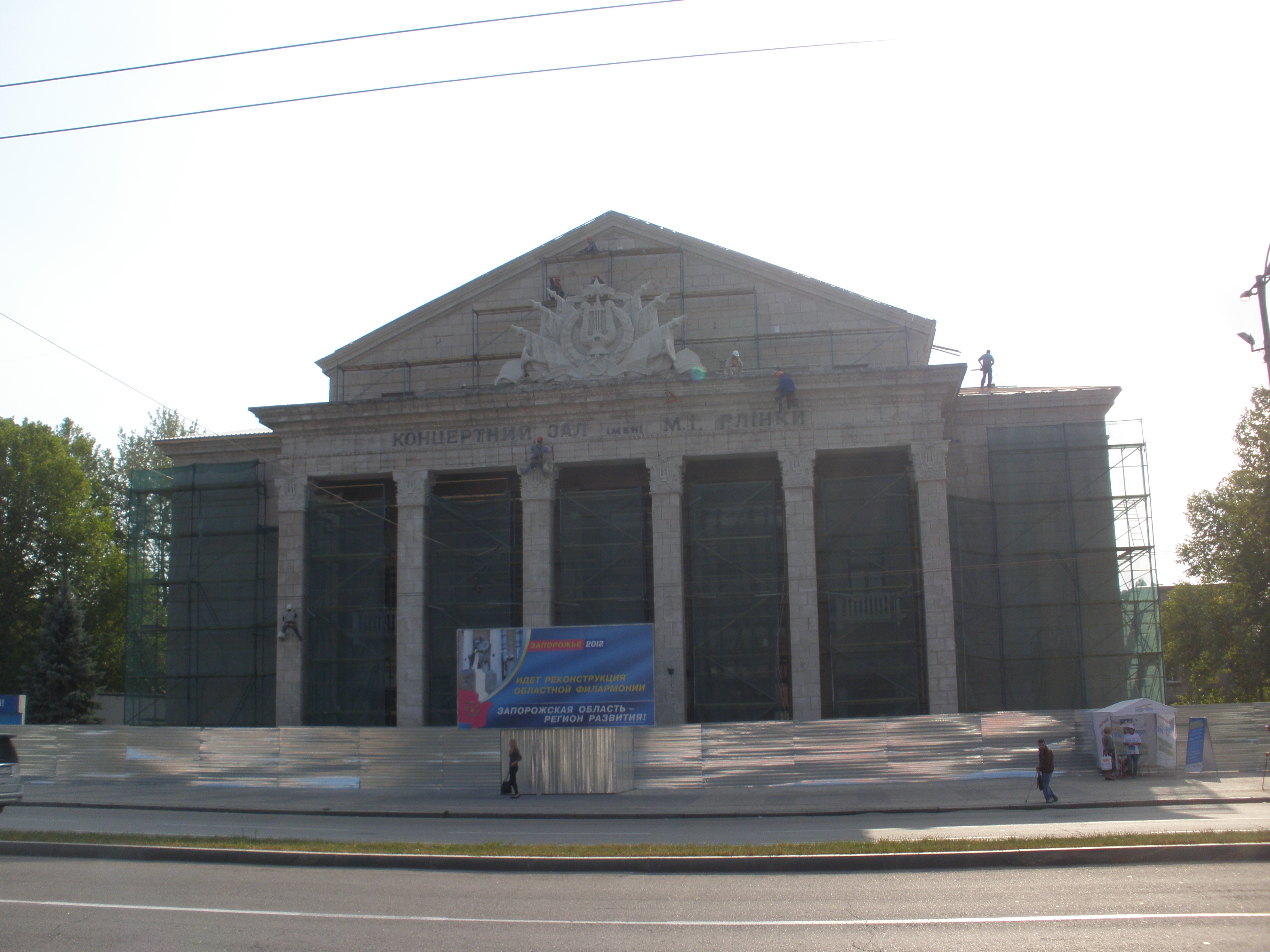 Концертний зал ім. Глінки під час ремонту у 2012